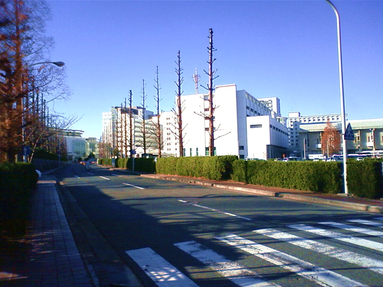 藤田保健衛生大学病院 ロータリー前